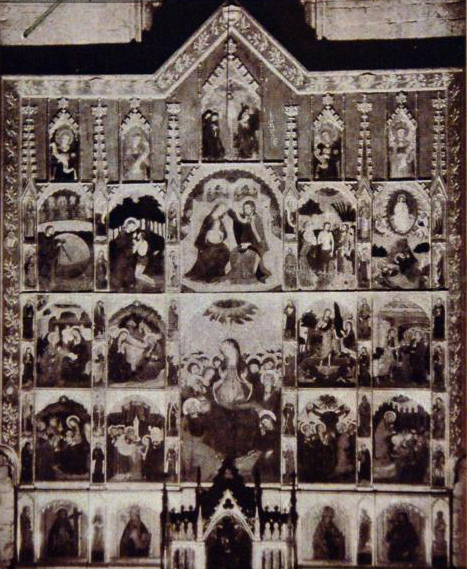 Vista del Retaule del Sant Esperit amb la predel·la afegida que es va substituir per l'actual el 1945